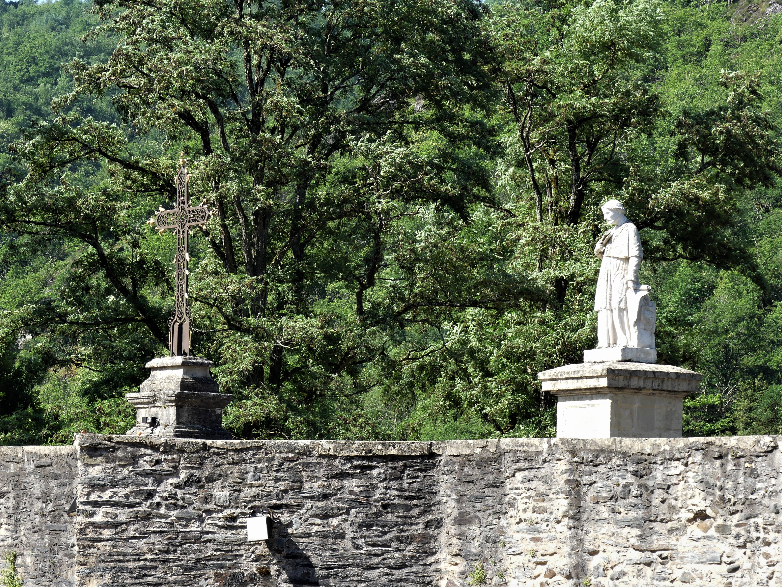 La croix et la statue de François d'Estaing au milieu du pont d'Estaing, Aveyron, France.